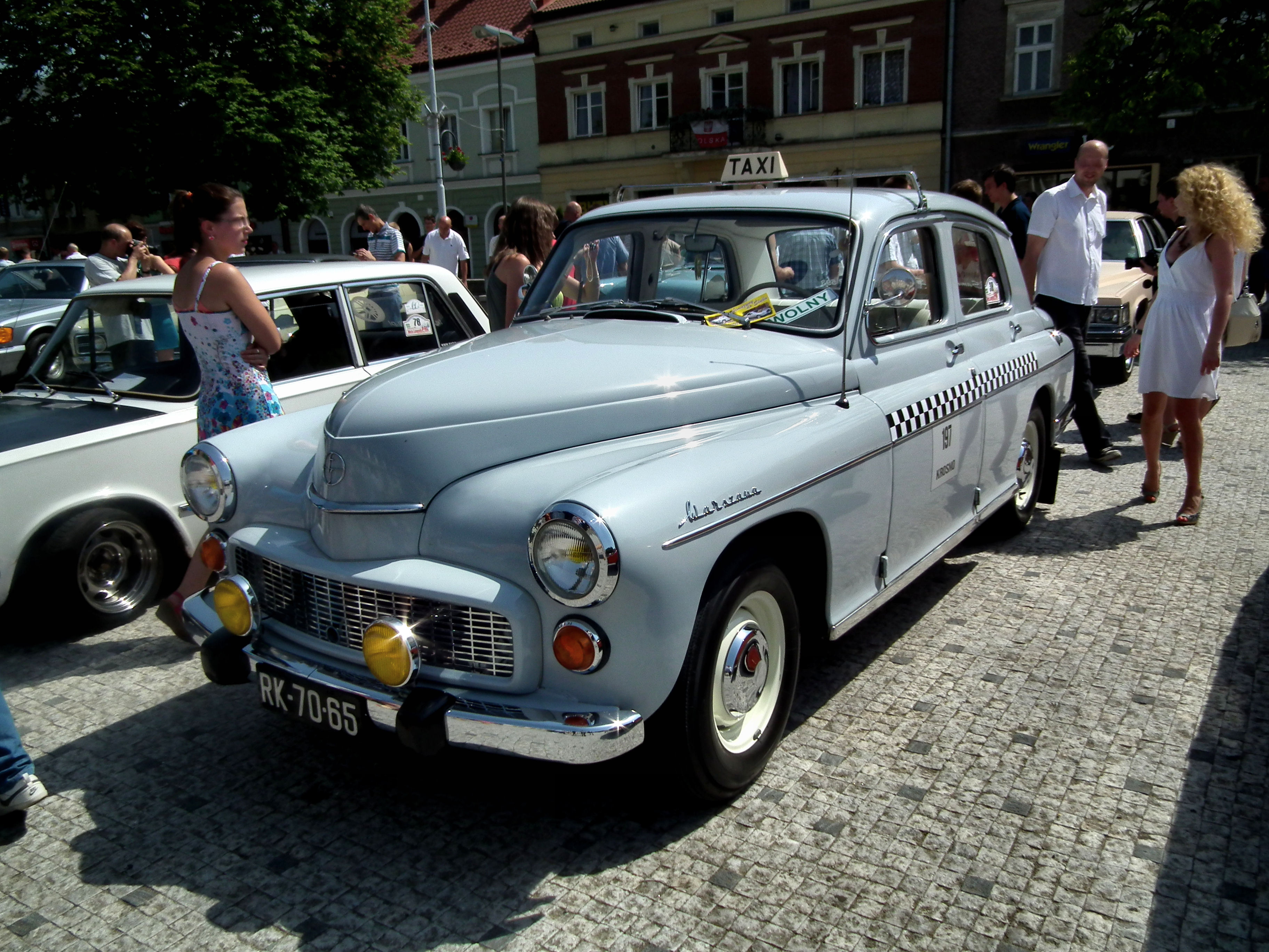 FSO Warszawa 224 w Jaśle.